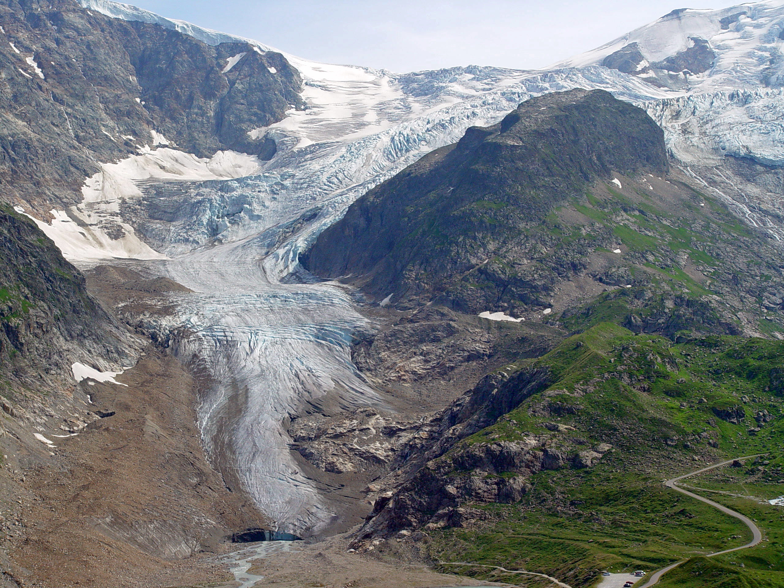 Ausblick auf Steingletscher von der Passstrasse